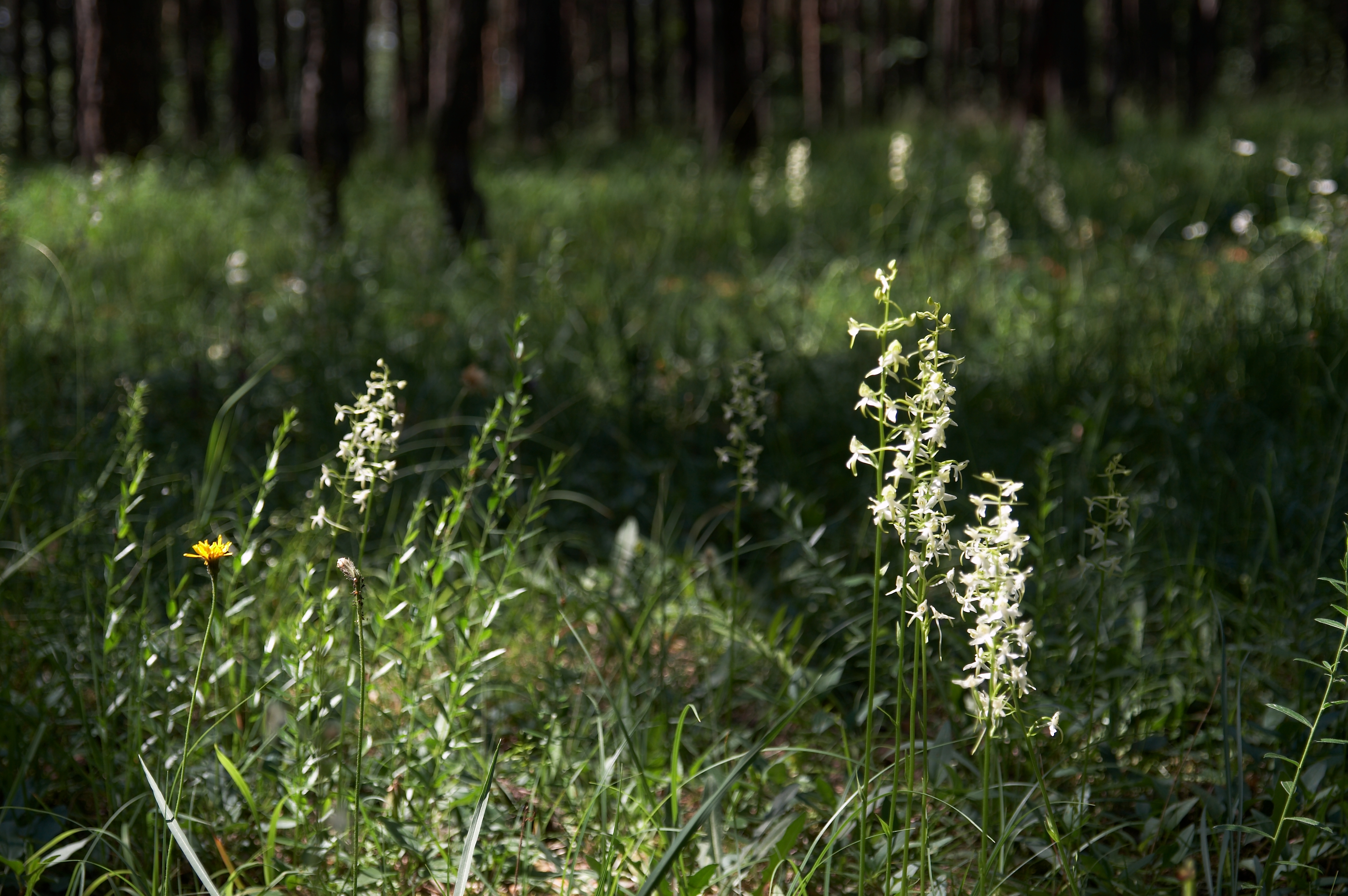 PR Na Černčí